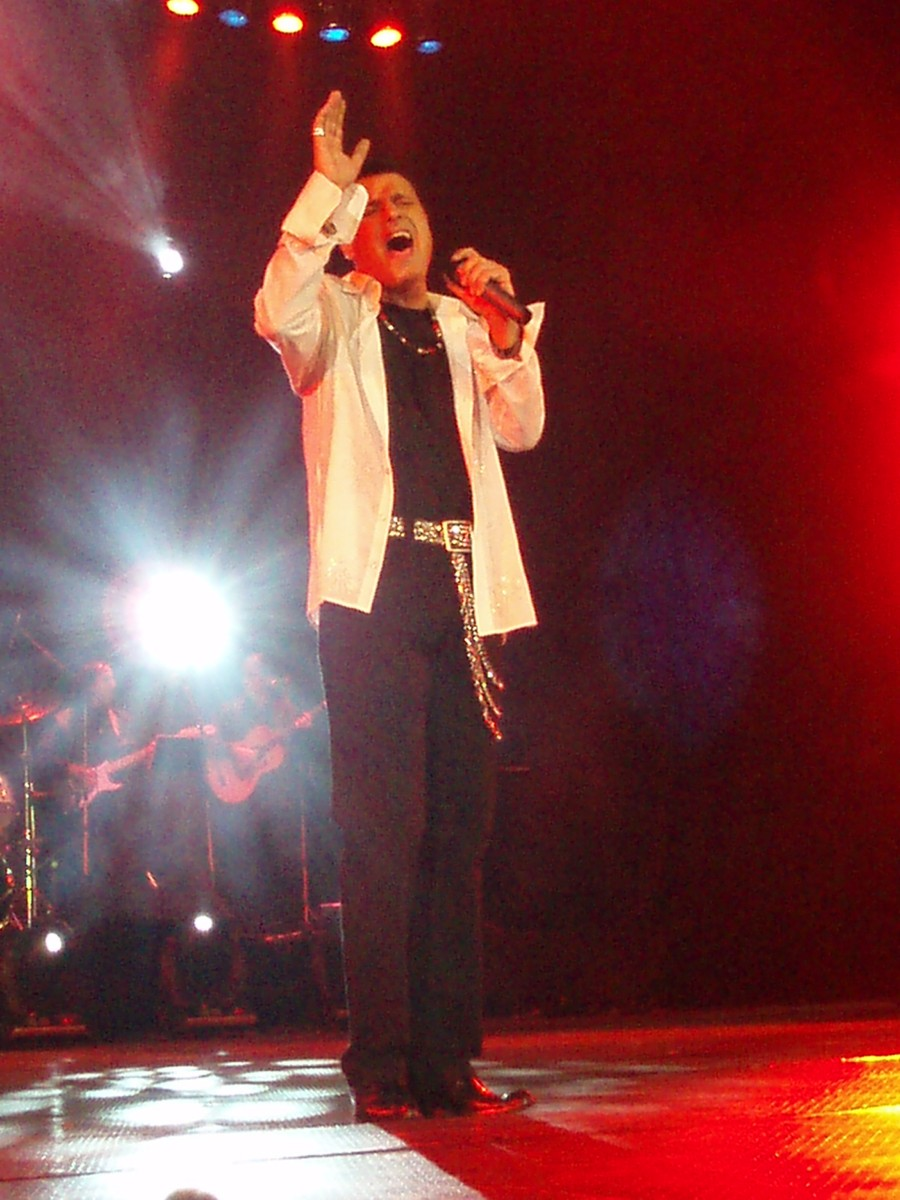 Concert photo of the Bulgarian singer Georgi Hristov (Снимка от концерт на Георги Христов)